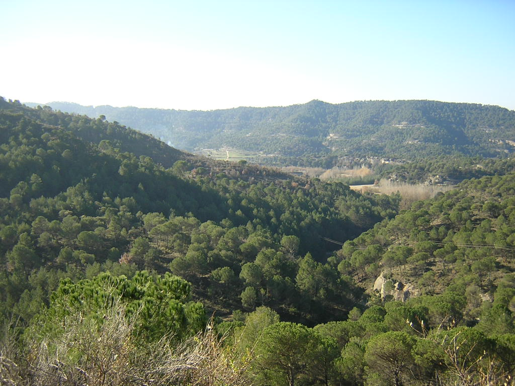 El torrent de Colljovà (Monistrol de Calders, Moianès)